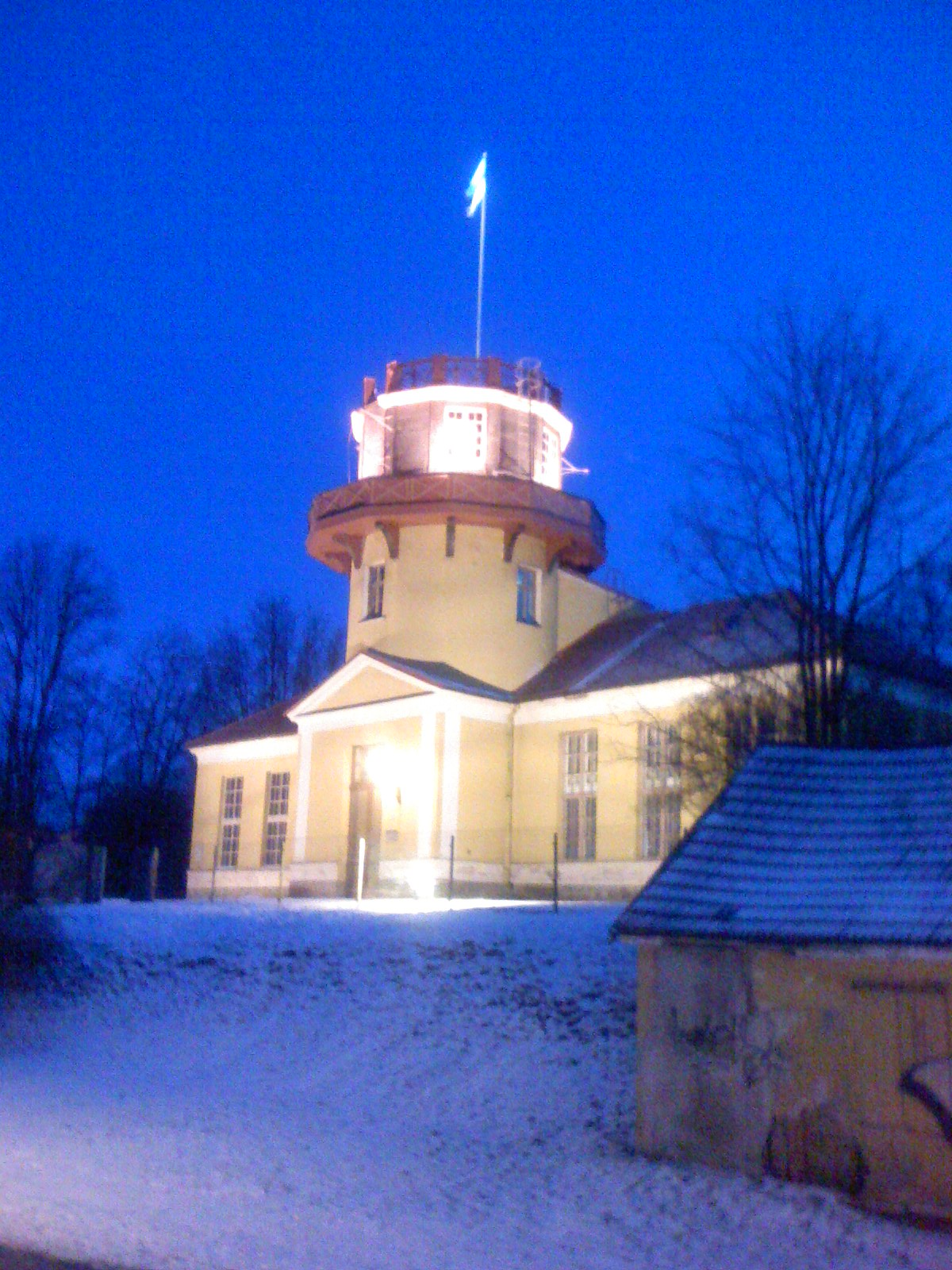 Tartu Tähetorn õhtul